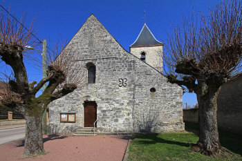 église de Marolles en Beauce